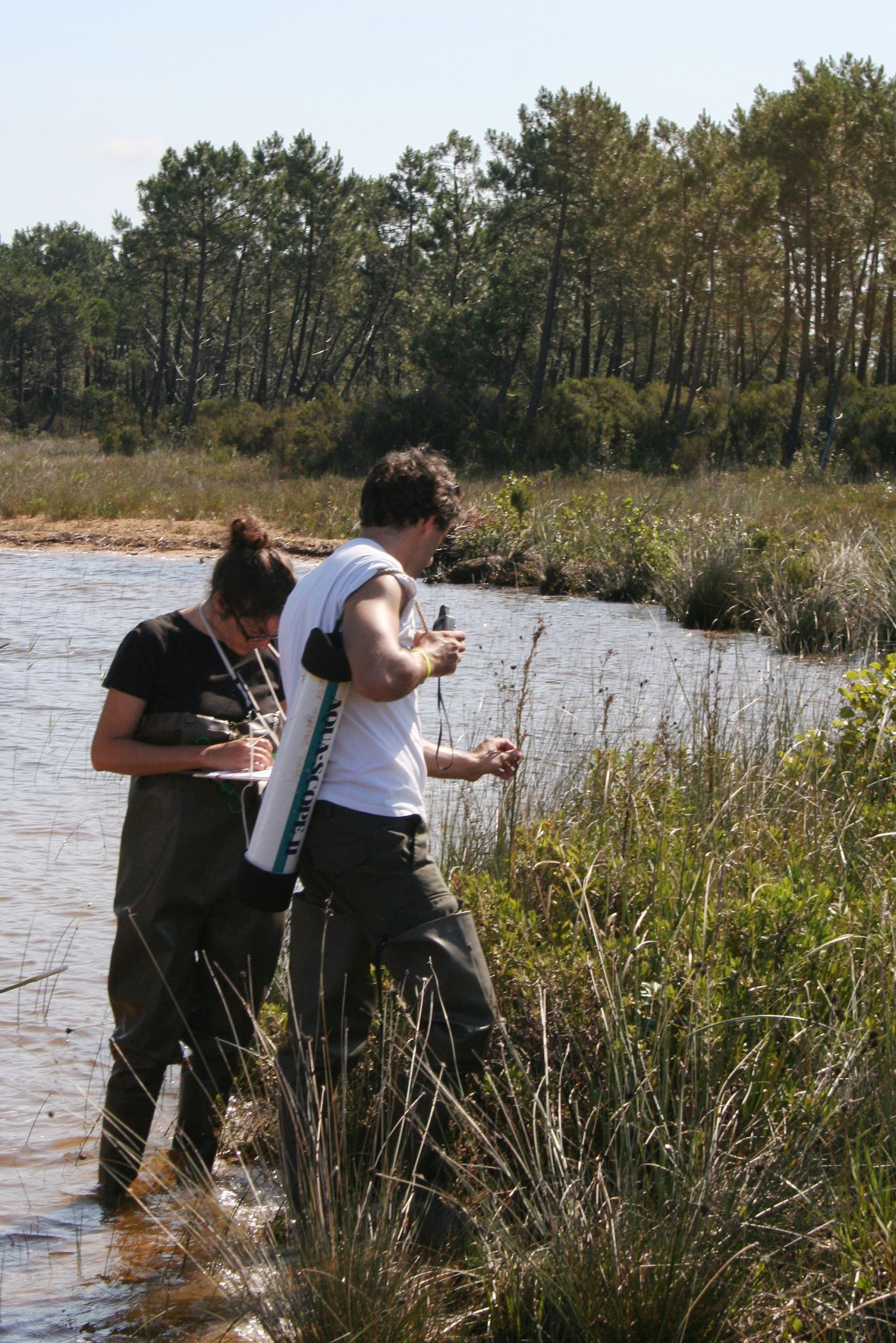 Bioindication-macrophytes, relevés de végétation